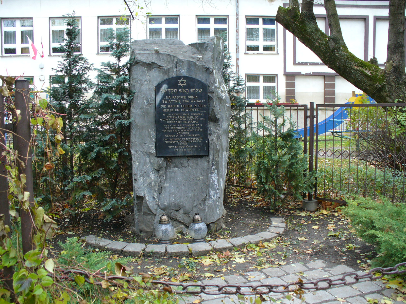 Opole - pomnik w miejscu zburzonej w 1938 r. Nowej Synagogi